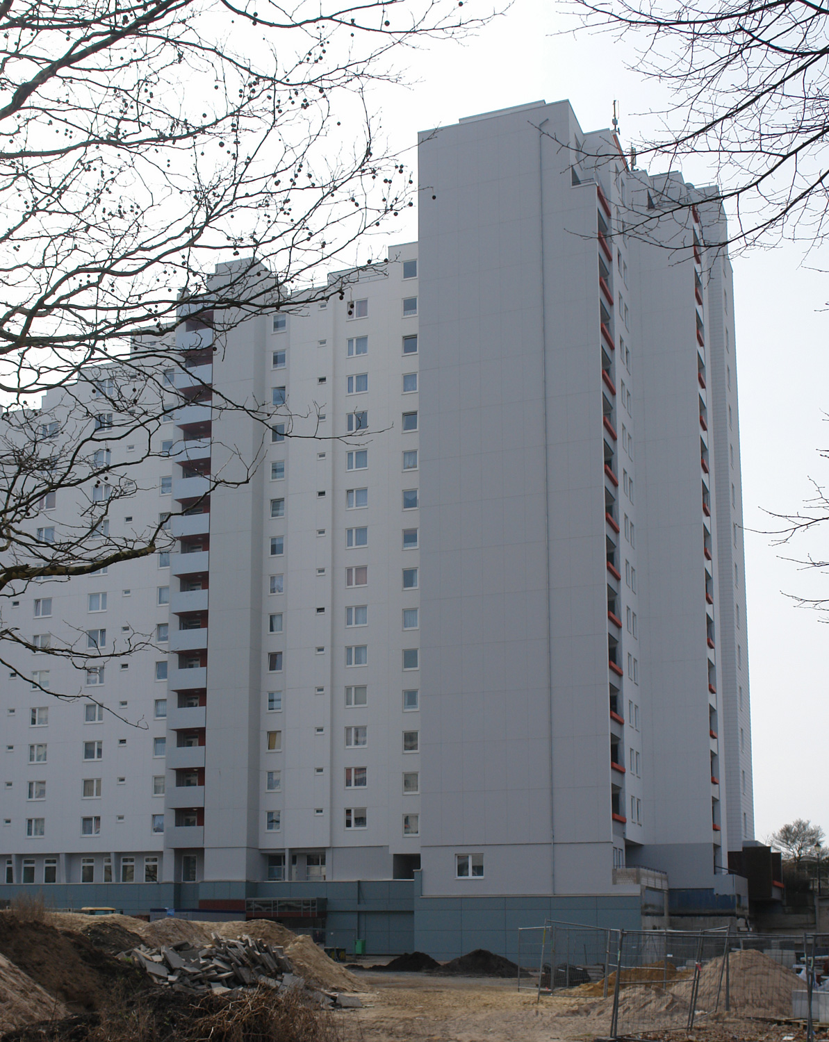 Bremen-Osterholz: Hochhaus in Tenever, Ludwigshafener Str. 12/14)